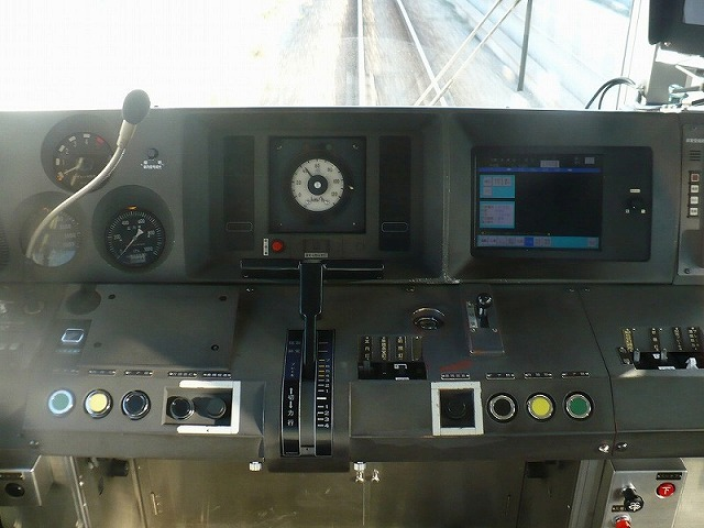 横浜高速Y000系の運転台